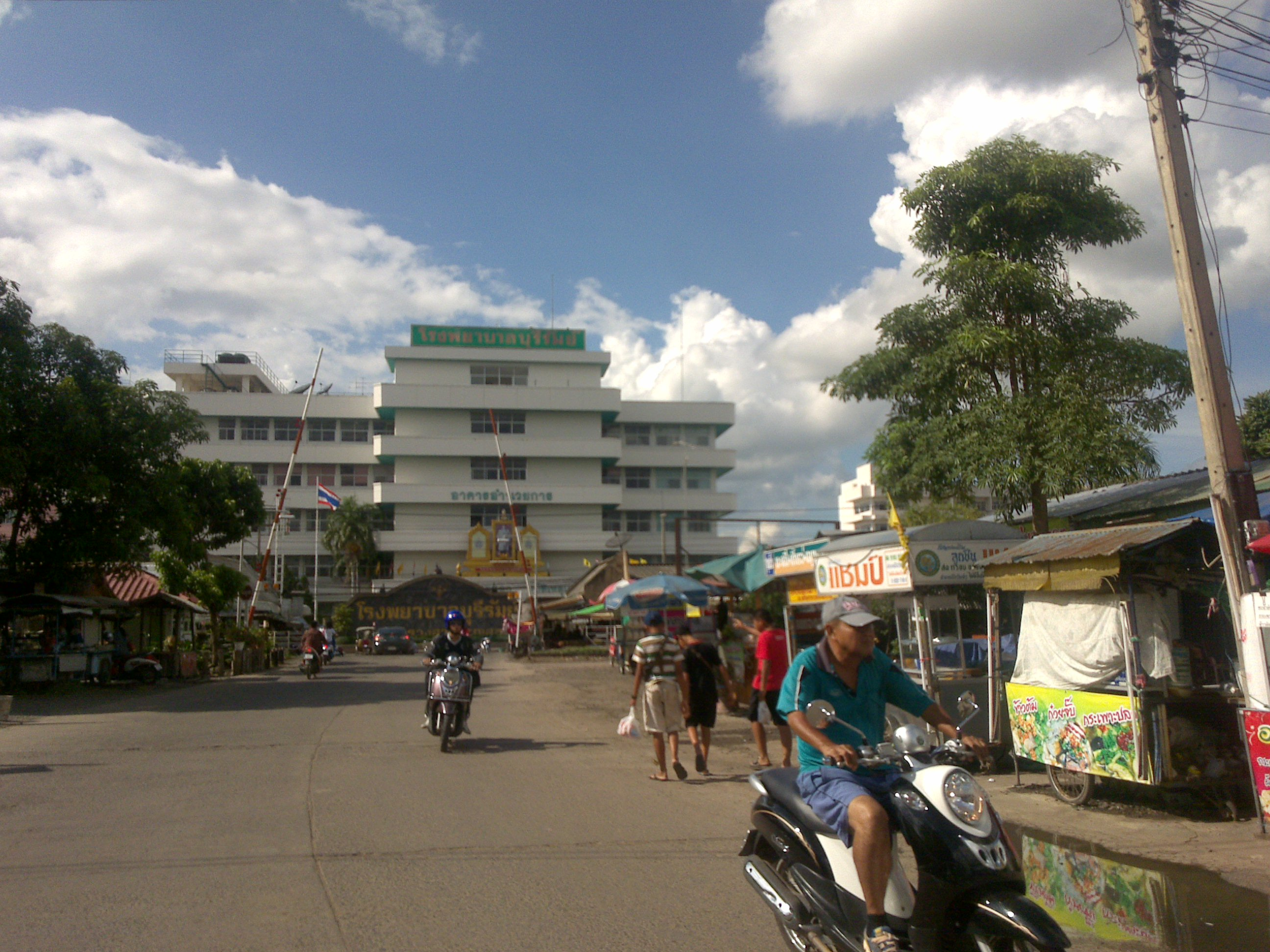 Buriram Hospital.